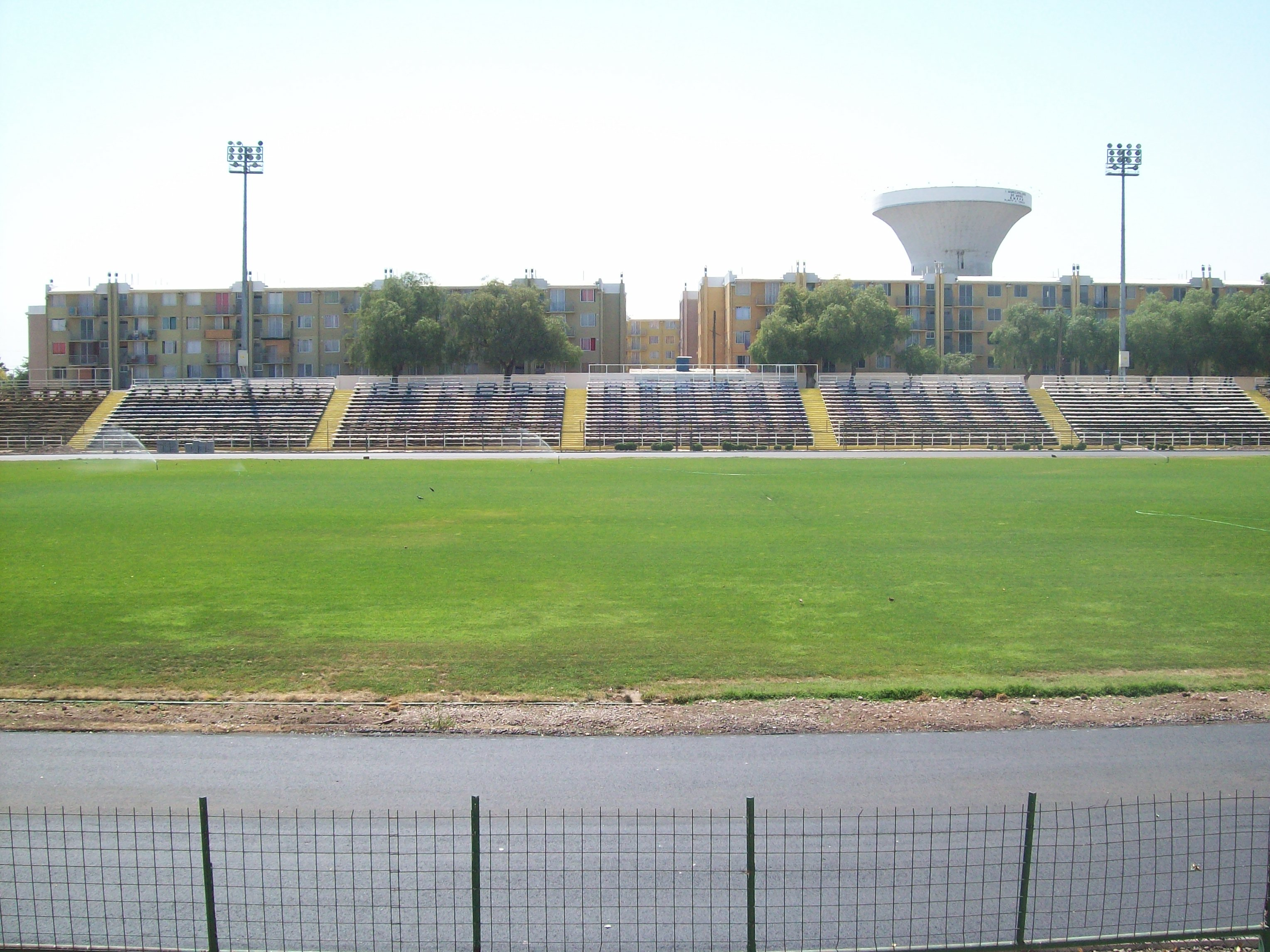 Césped, pista atlética y tribuna del Estadio Santiago Bueras.